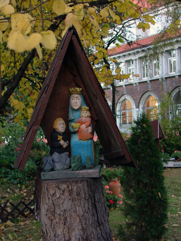 PL Warsaw, Poland, Orioniści, ul Barska 4